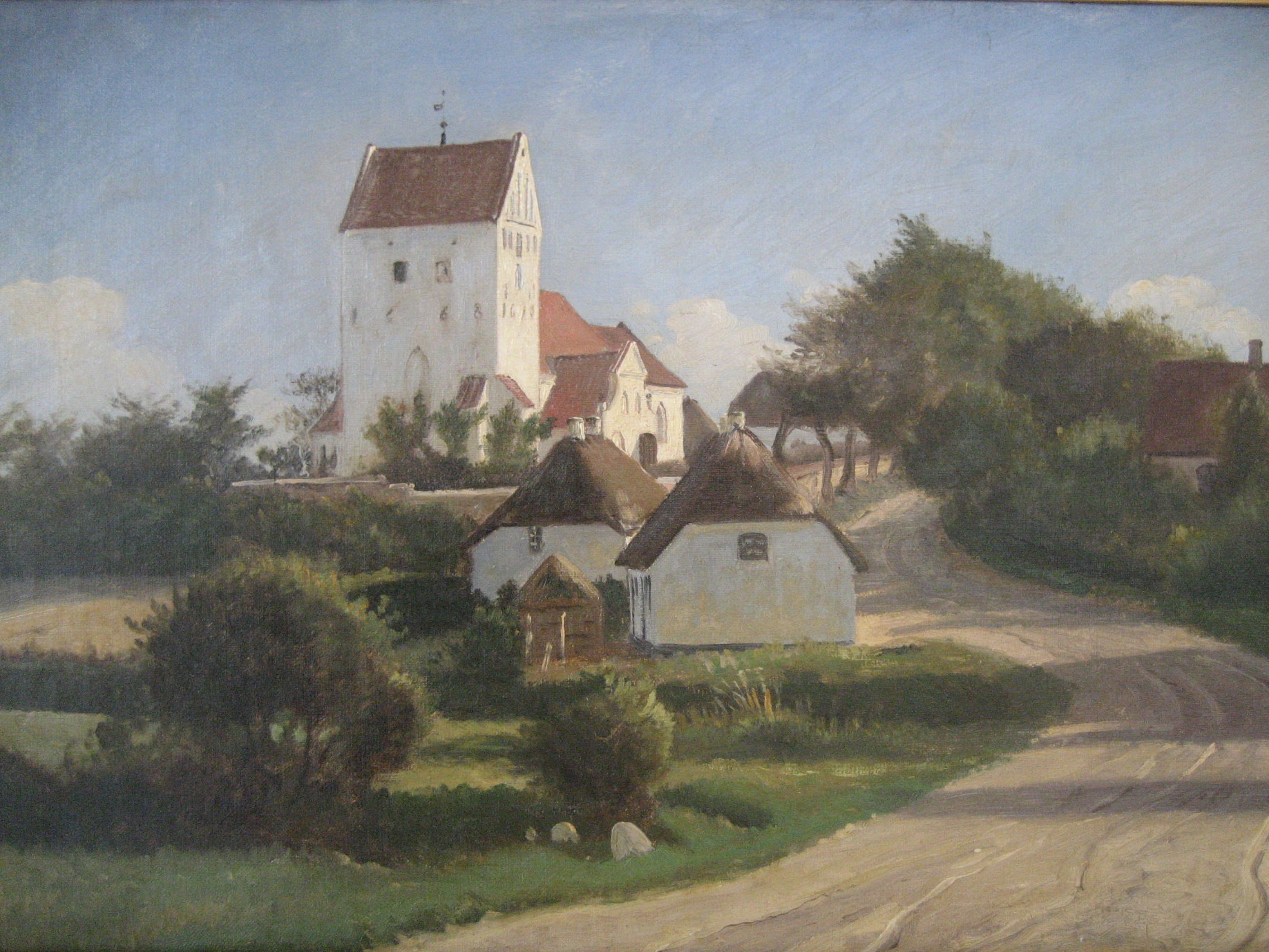 Painting